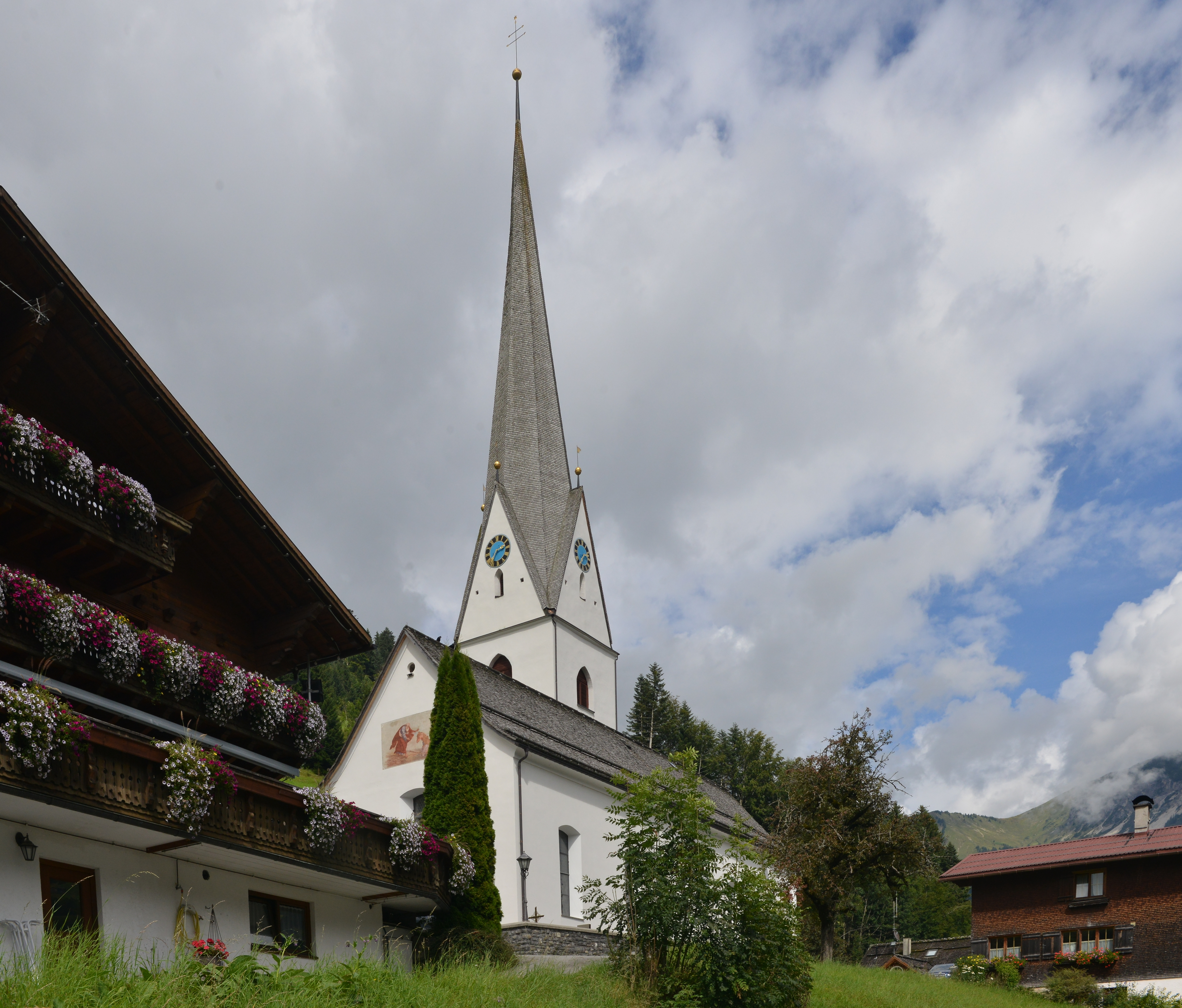 Pfarrkirche "hll. Oswald und Dominikus" in Sonntag im grossen Walsertal, Vorarlberg.